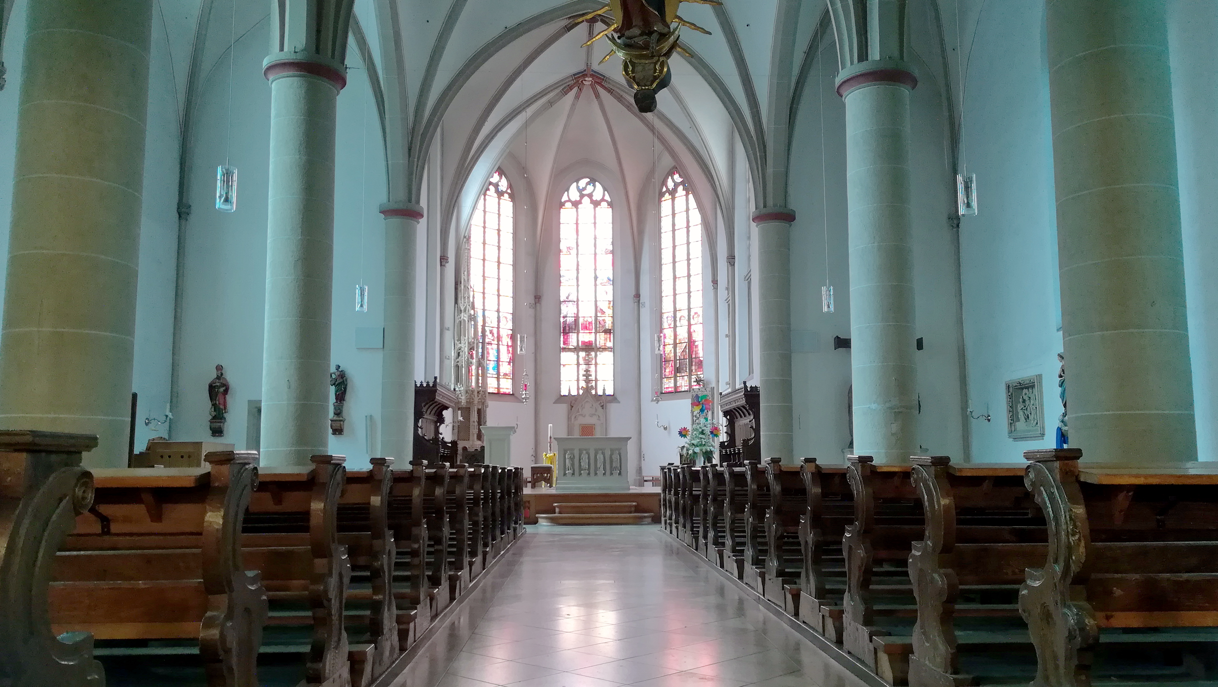 Die katholische Pfarrkirche St. Marien wurde um 1285 gegründet.